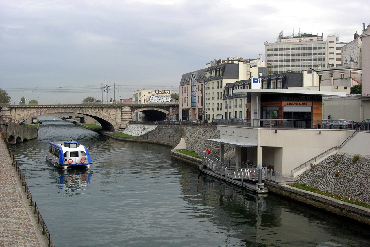 L'Estree a la station Corentin Cariou sur le canal Saint-Denis